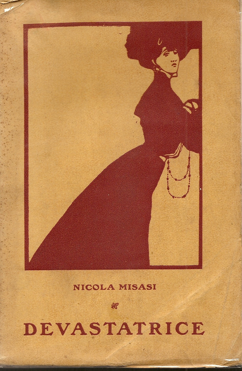 Copertina prima edizione di "Devastatrice" di Nicola Misasi, Napoli, Detken & Rocholl, 1907